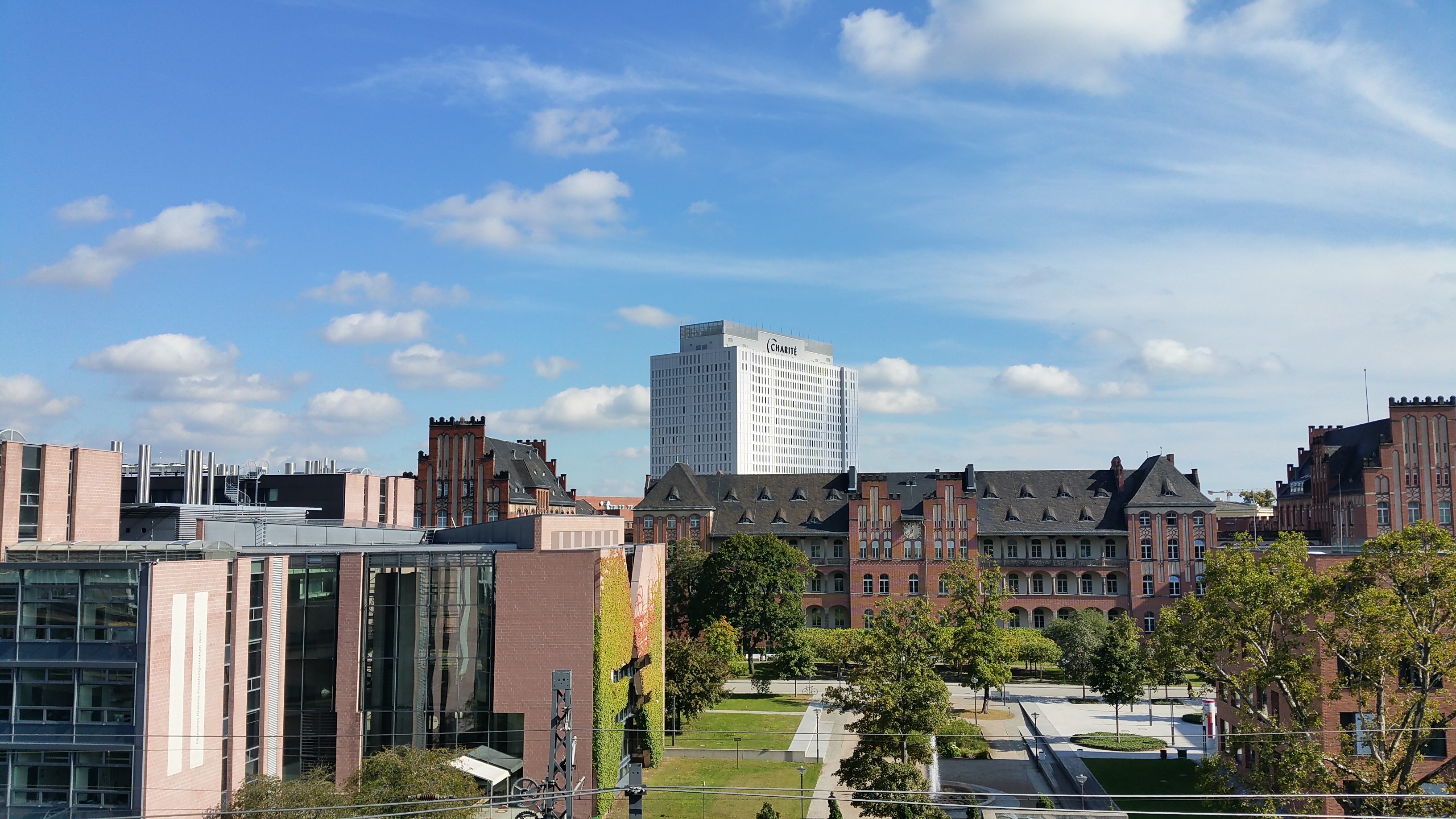 Blick auf das Charité Ensemble